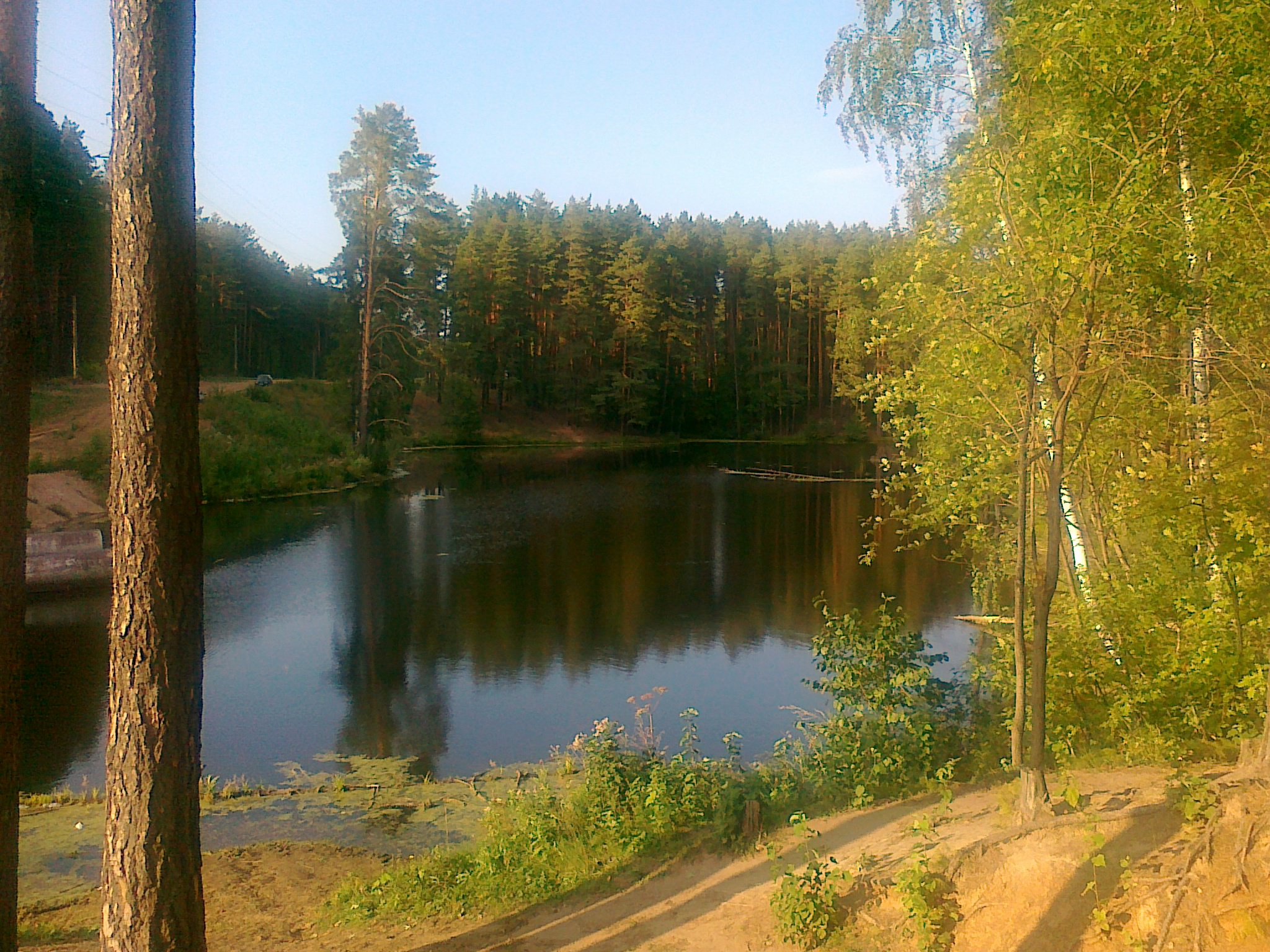 Озеро в Лесопарке